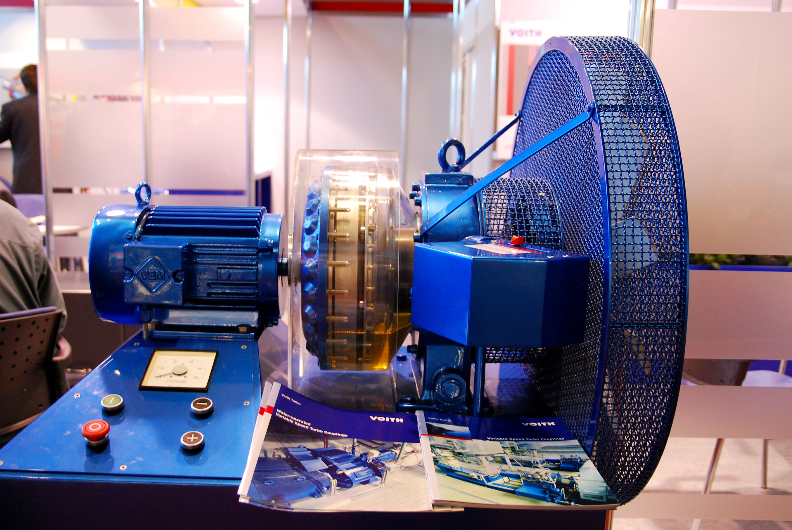 Urządzenie górnicze zdjęcie wykonane podczas Międzynarodowych Targów Górnictwa, Przemysłu Energetycznego i Hutniczego w Katowicach w Spodku